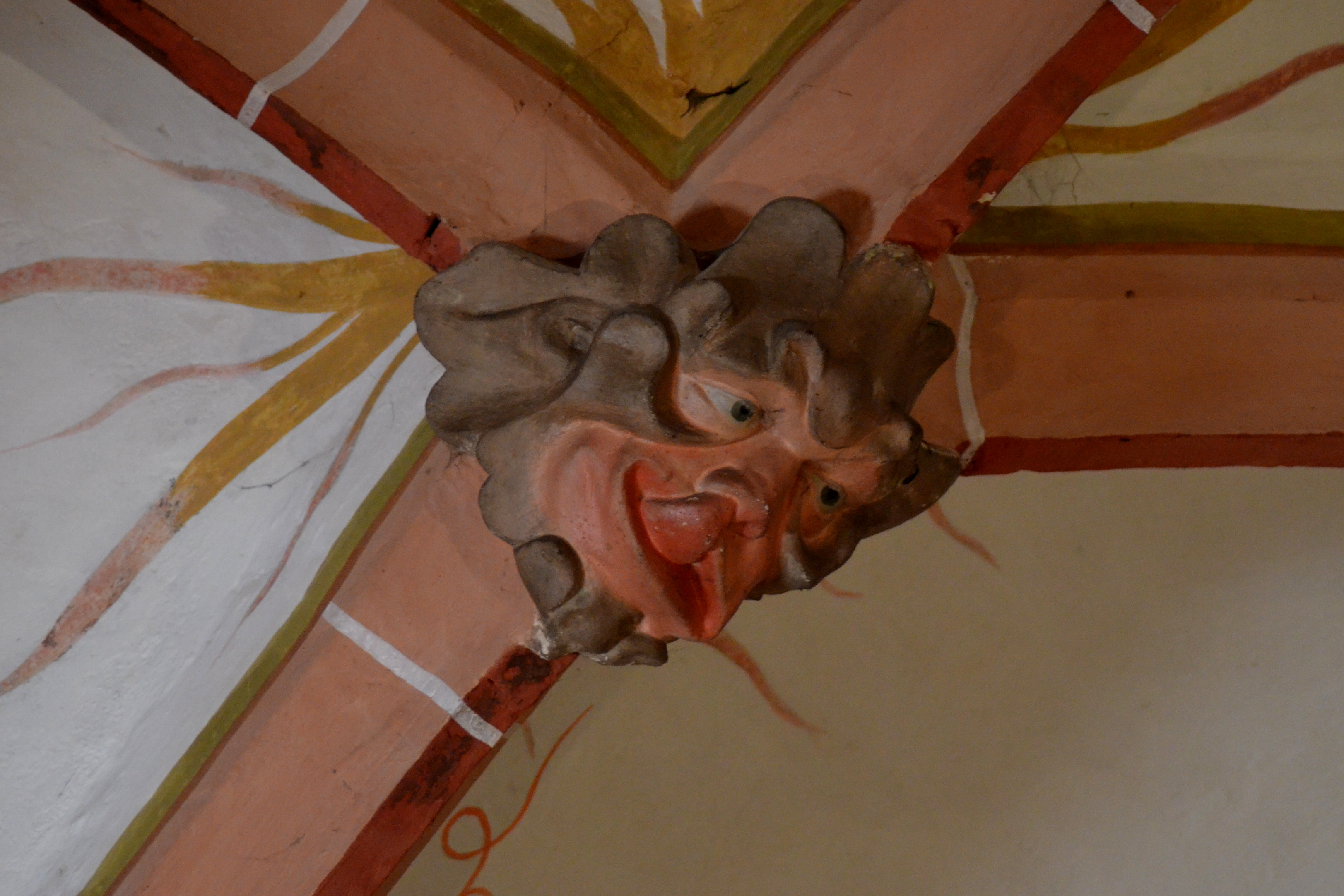 Sluitsteen